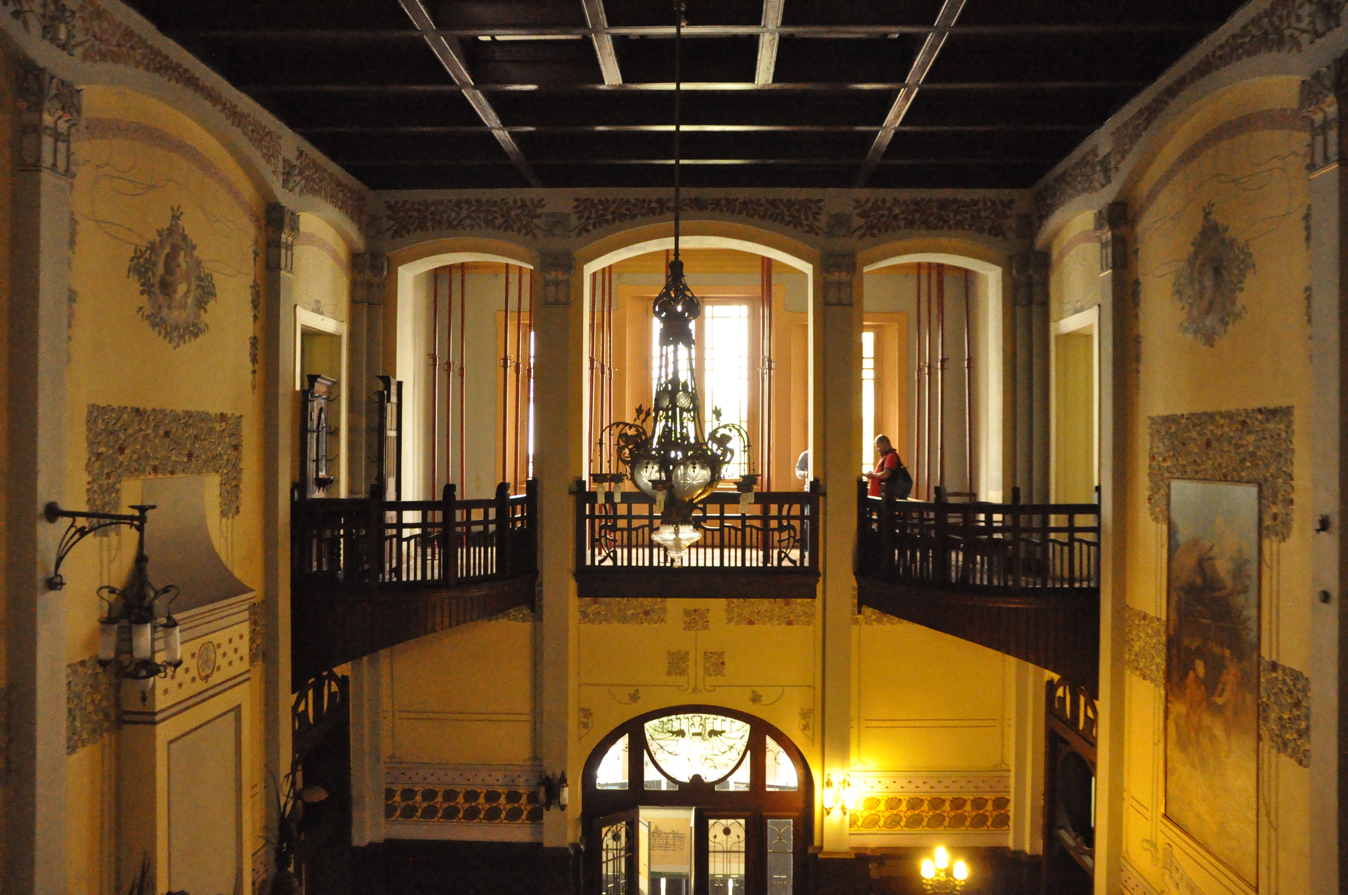 Fau Maranhão Foto por Ana Fidelis